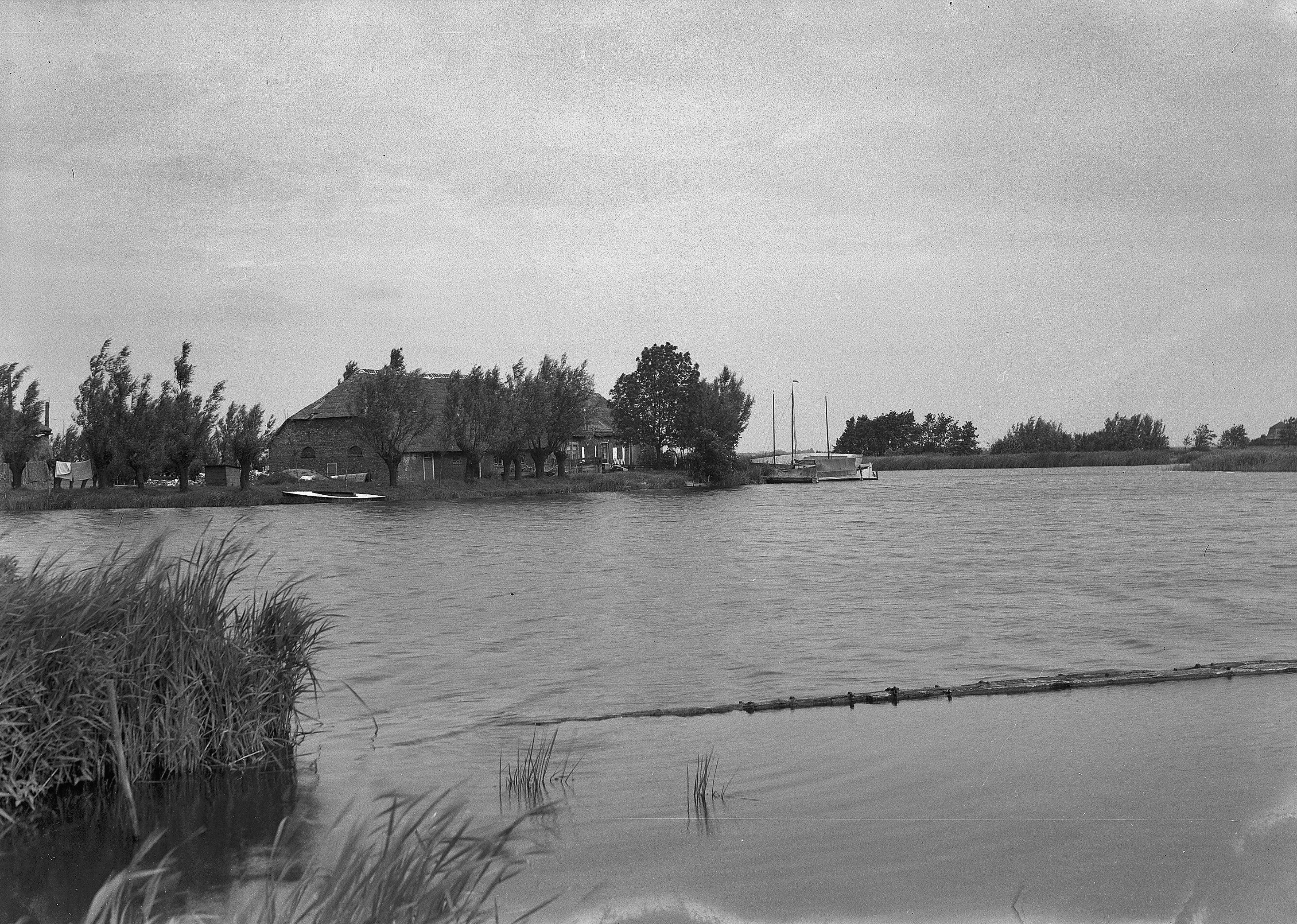 Binnenwegsepolder, middelmolen nr. 6: zo geheten Pekhuis aan de Rottemeren